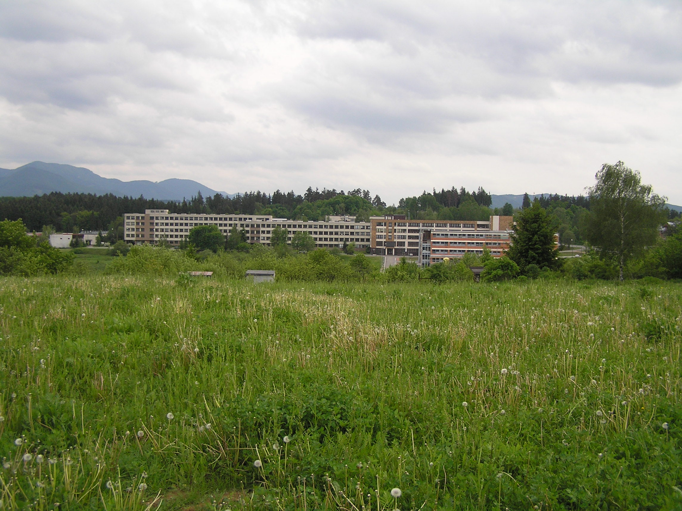 Žilina, pohľad z Veľkého dielu: Žilinská univerzita